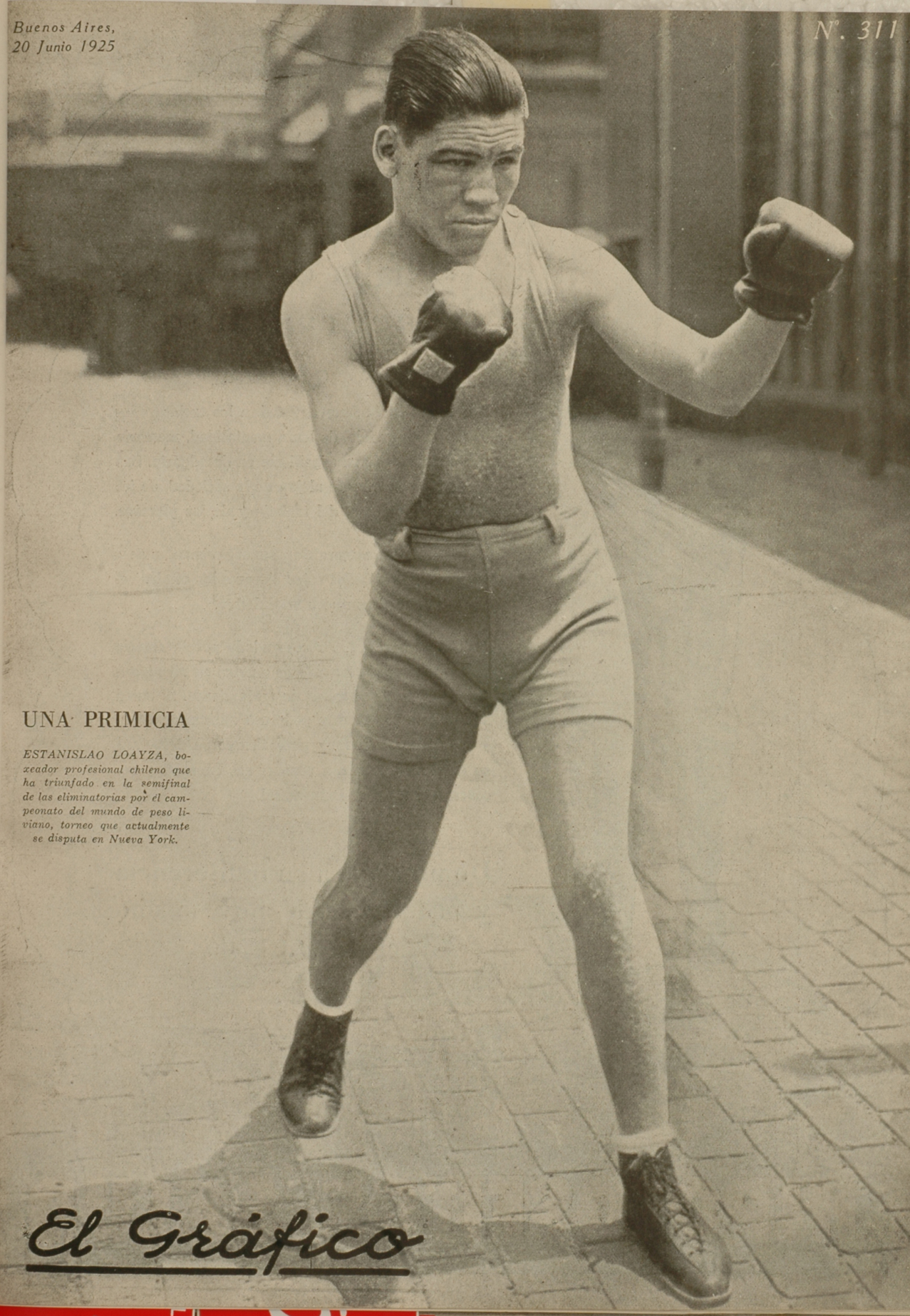 El Grafico del 20 de Junio de 1925. Edicion 311